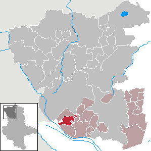 (Original text: Dannefeld im Altmarkkreis Salzwedel)